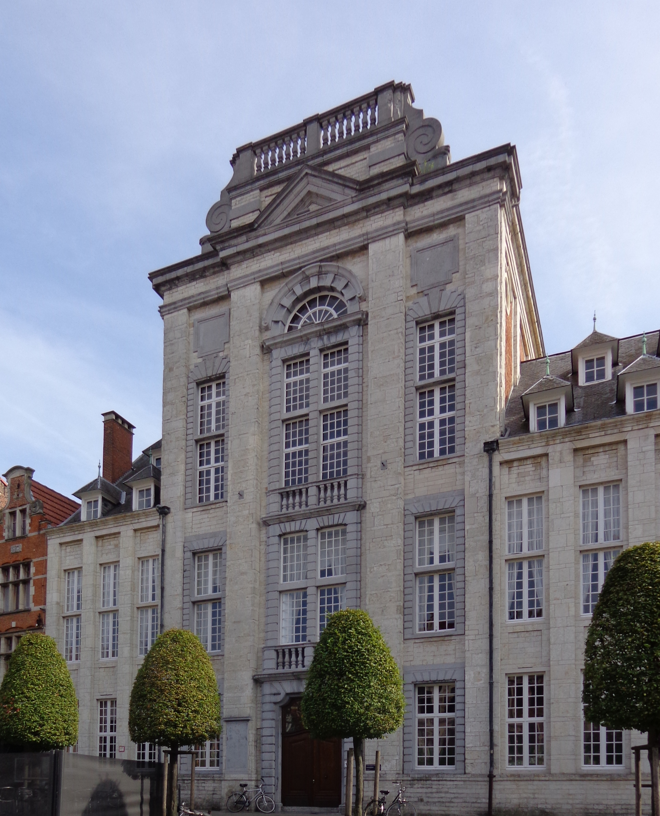 Universiteitshal K.U.Leuven - ingang via de Oude Markt 13